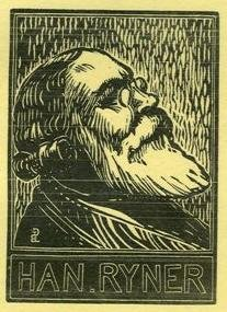 French philosopher and journalist Han Ryner (1861-1938) by Pierre Larivière (1884-1932)